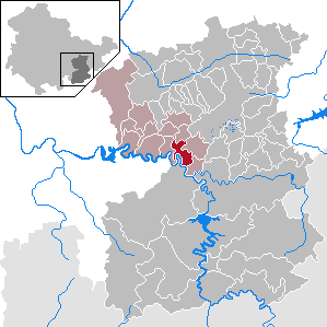 Ziegenrück in Thuringia - Saale-Orla-Kreis